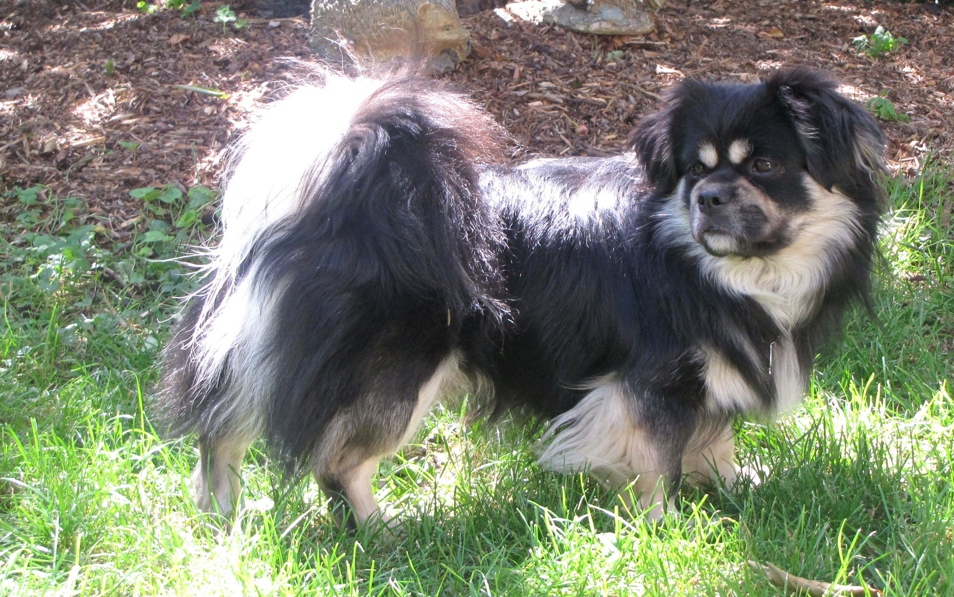 Photo d'un épagneul du tibet, 3ans.